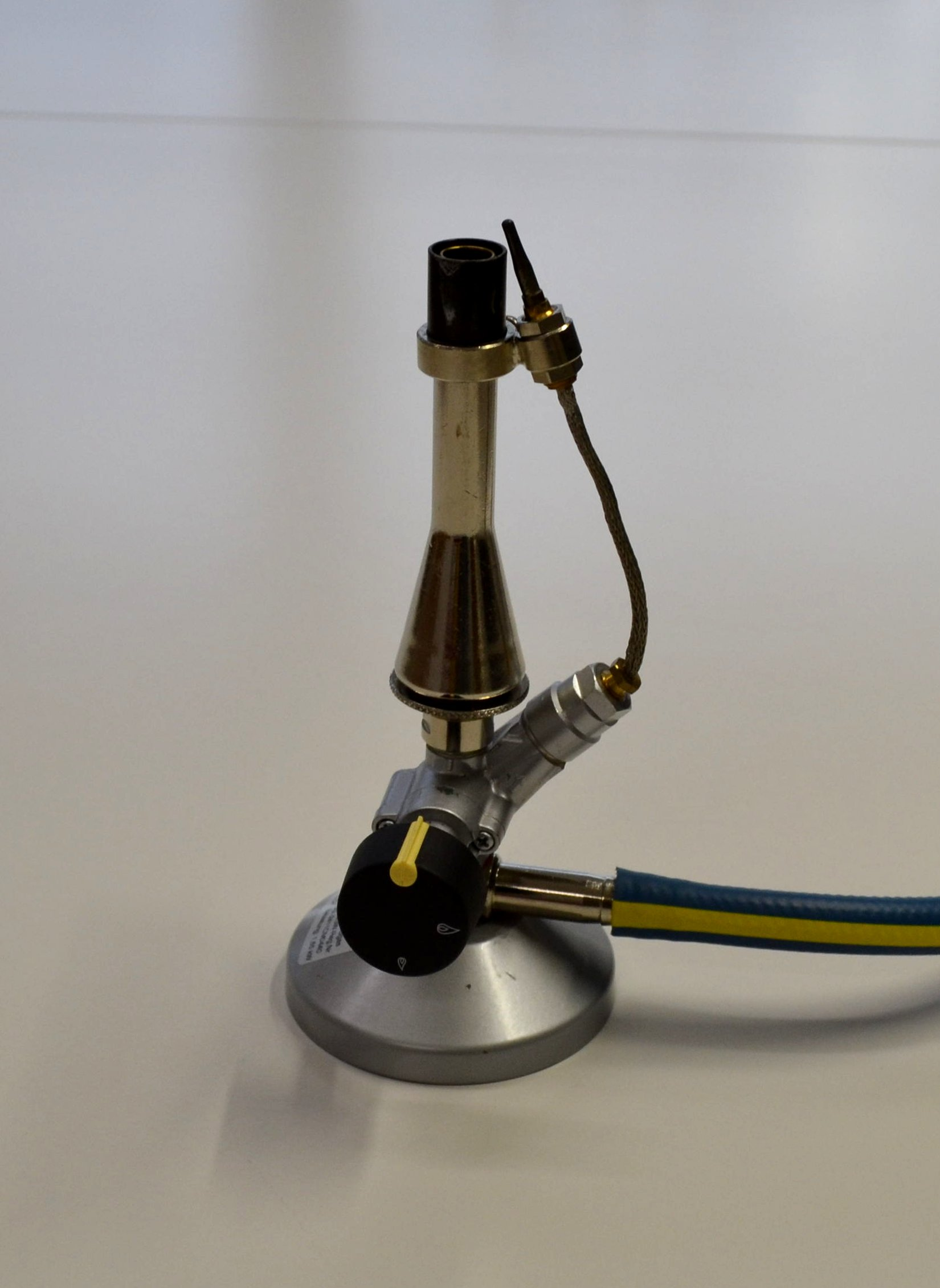 Teclu Brenner